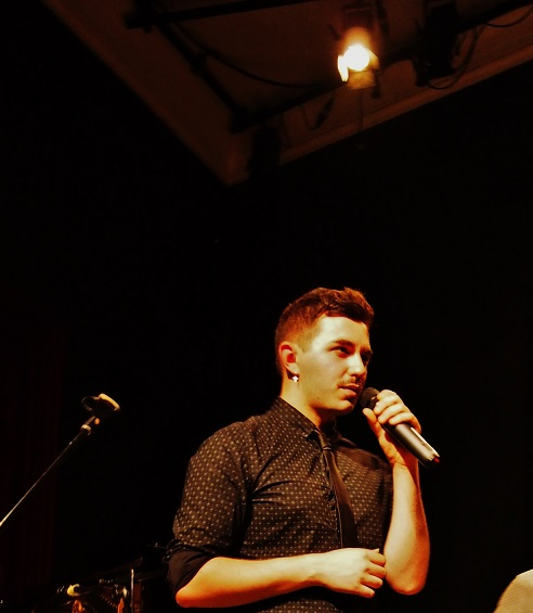 El cantautor napolitano Alessio Arena en escena en 2014